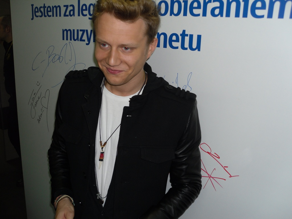 Zdjęcie zrobione podczas Eska Music Awards 2011 w katowickim Spodku.